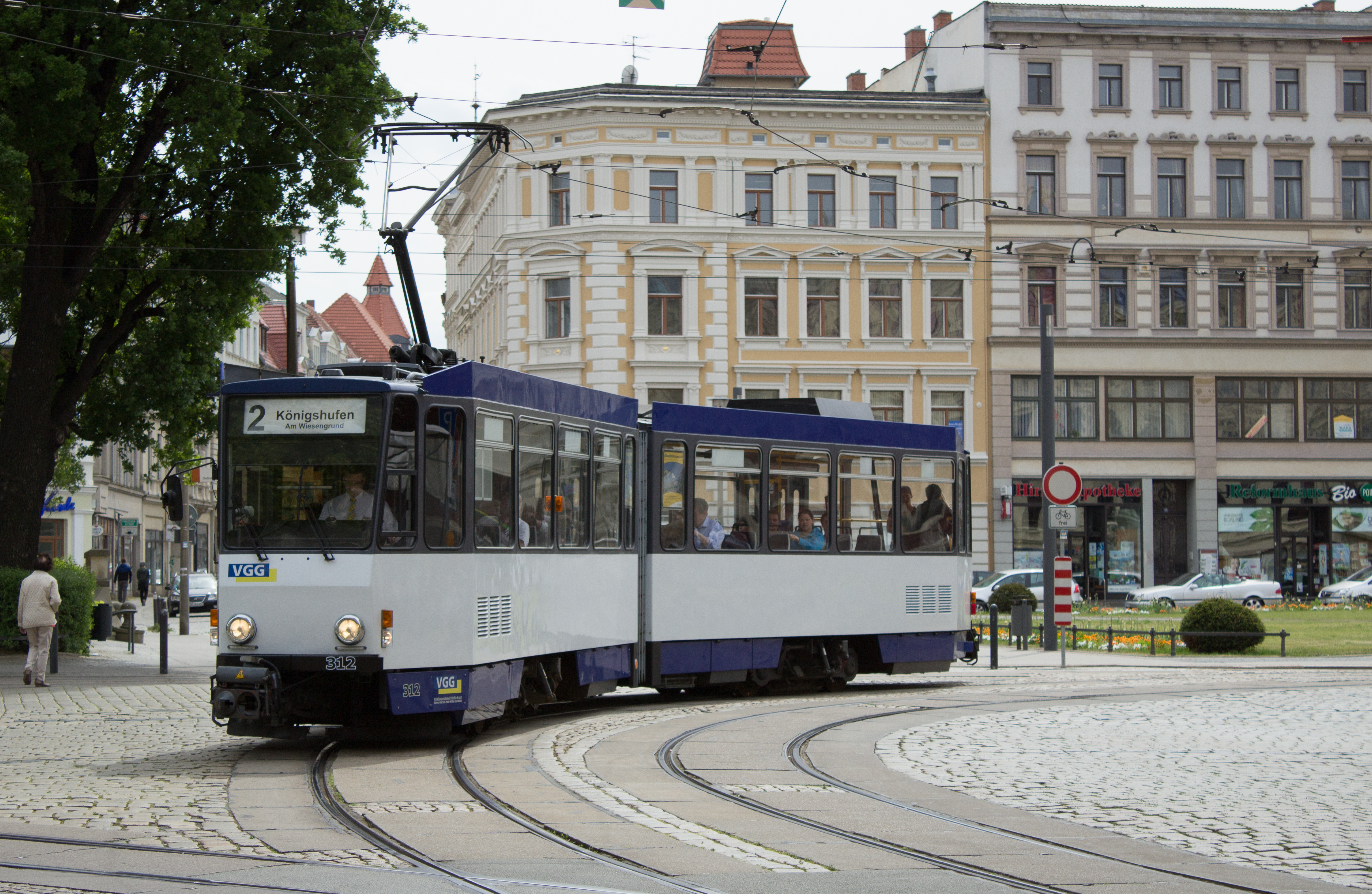 Straßenbahnwagen 312 Görlitz am Postplatz